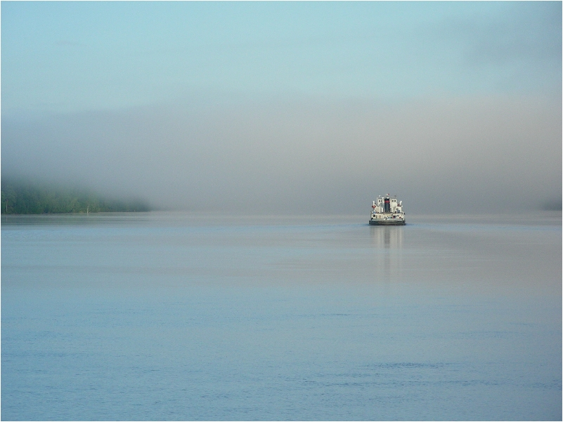 Russland, Karelien, Fluss Swir